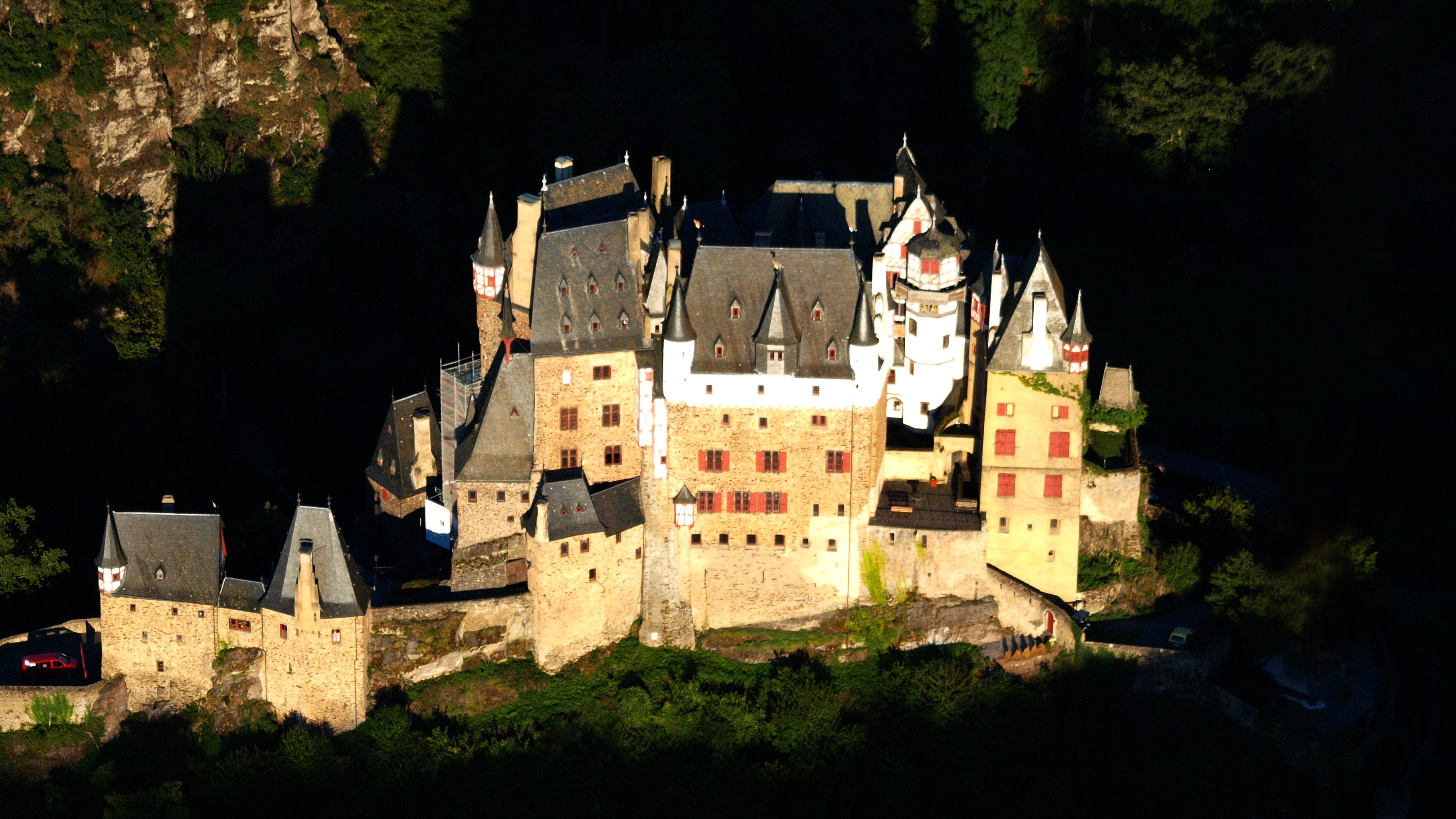 Burg Eltz aus der Vogelperspektive